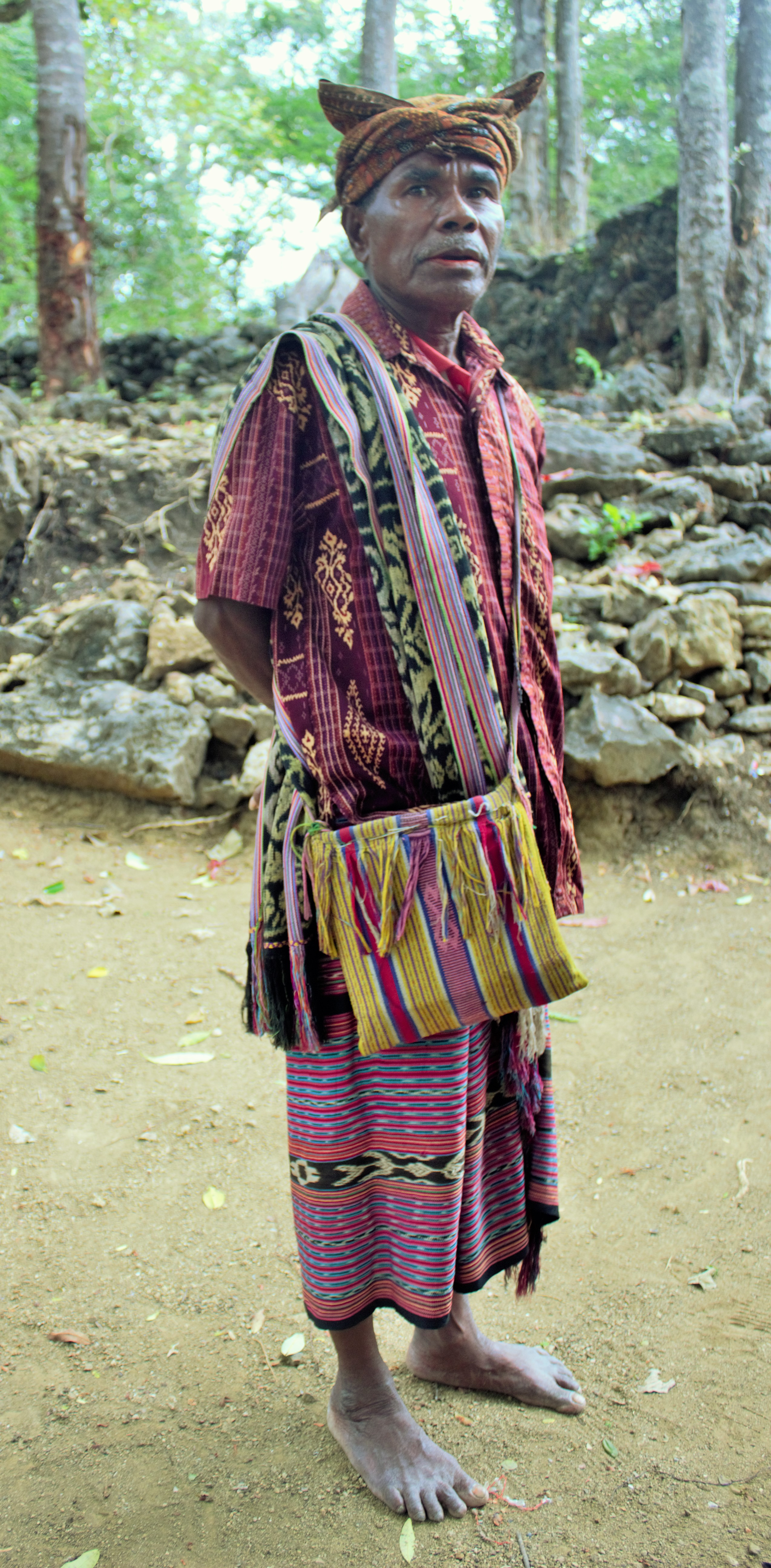 Kabupaten Belu, Provinsi Nusa Tenggara Timur memiliki kampung adat yang masih bertahan pada kearifan lokal. Mereka masih menjaga rumah adat dan menjalankan tradisi kuno yang dipercayai. Suku tertua di wilayah Indonesia bagian timur ini masih memiliki kepala suku sebagai pemimpin warga dalam menjalankan ritual terhadap para leluhur.